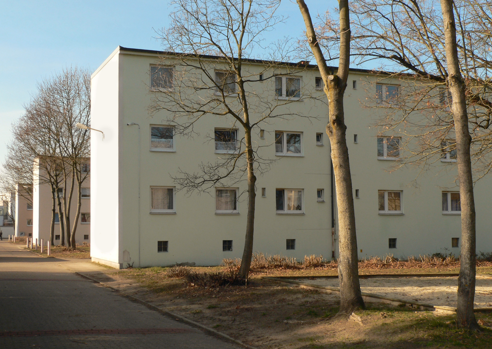 Siedlung Georgsgarten in Celle mit Blocks